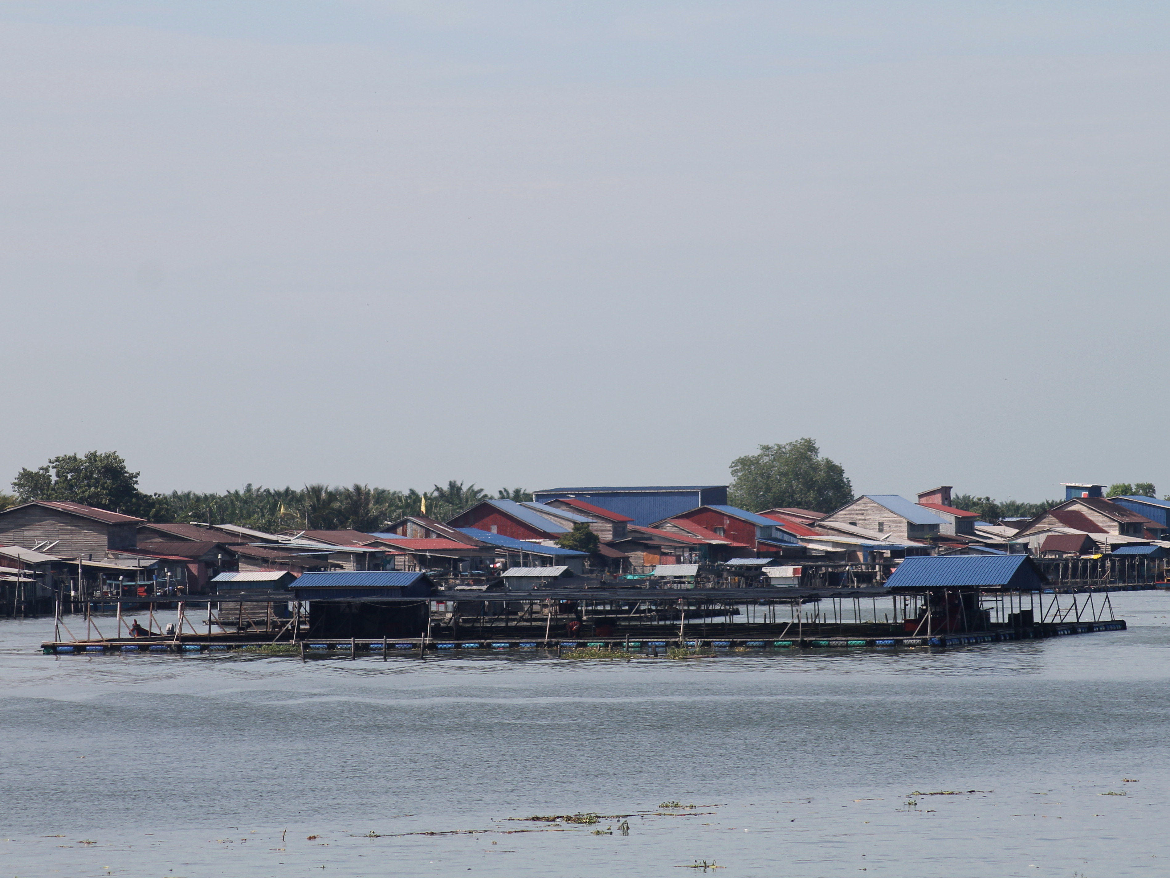 Ternakan ikan sangkar di Kuala Kurau.